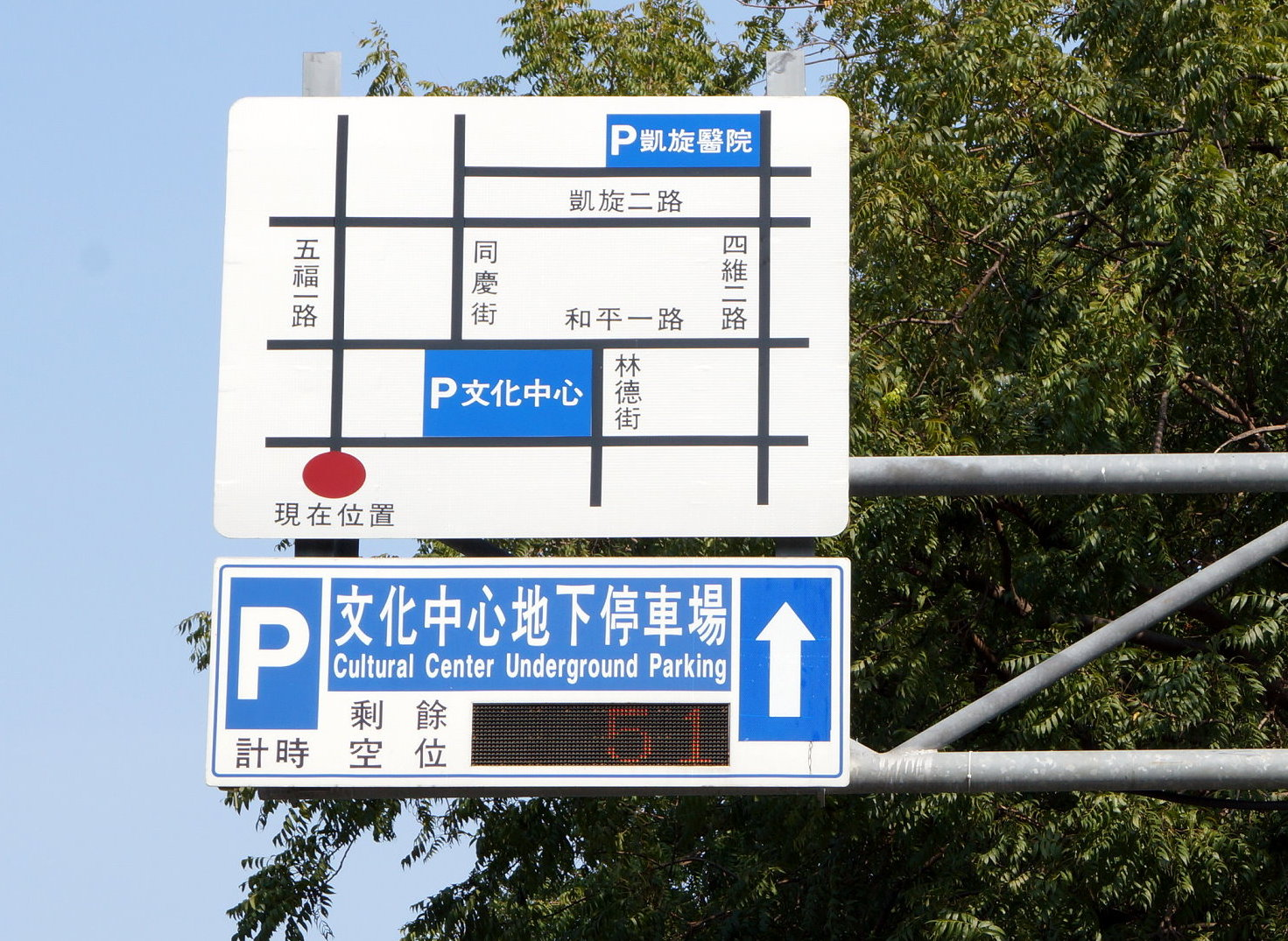 高雄市文化中心停車導引資訊系統